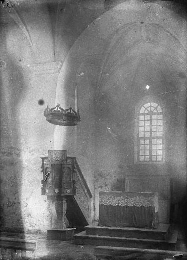 Беларуская (тарашкевіца): Койданаў (Kojdanaŭ)